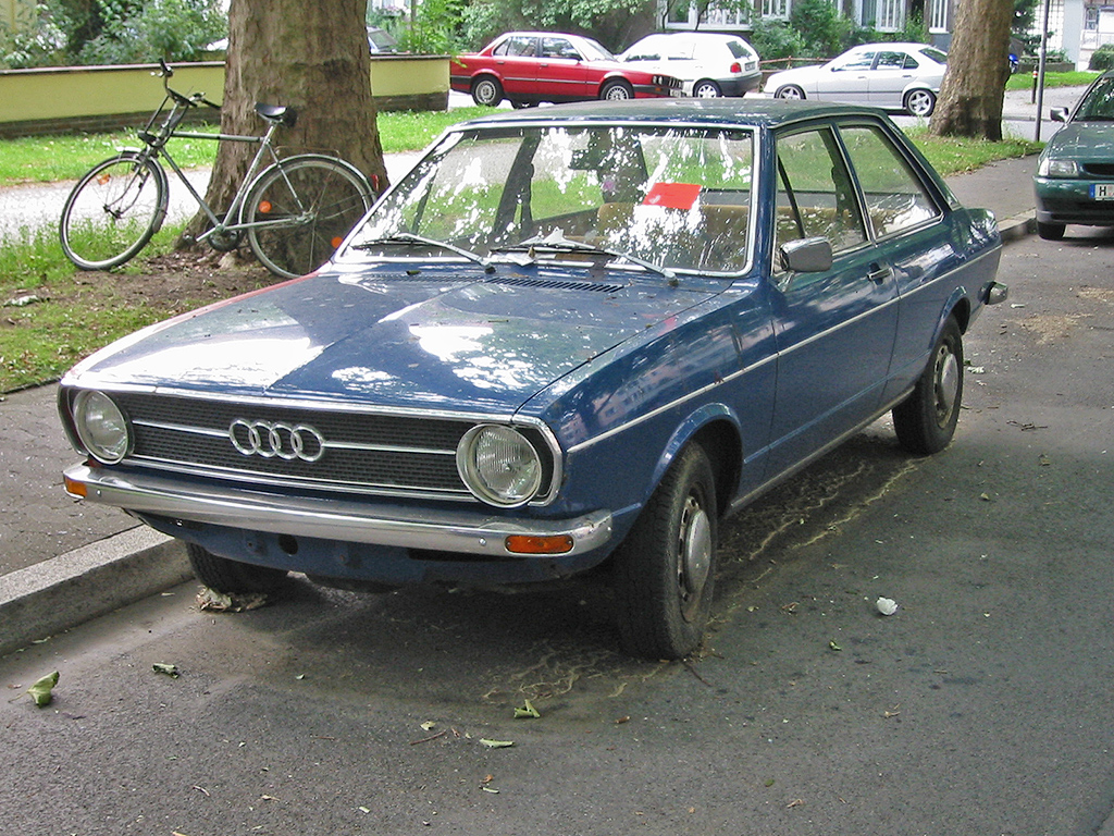 Audi 80 in stato di abbandono (B1)